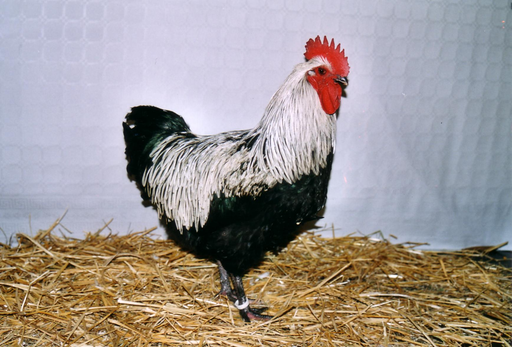 Coq Marans NA